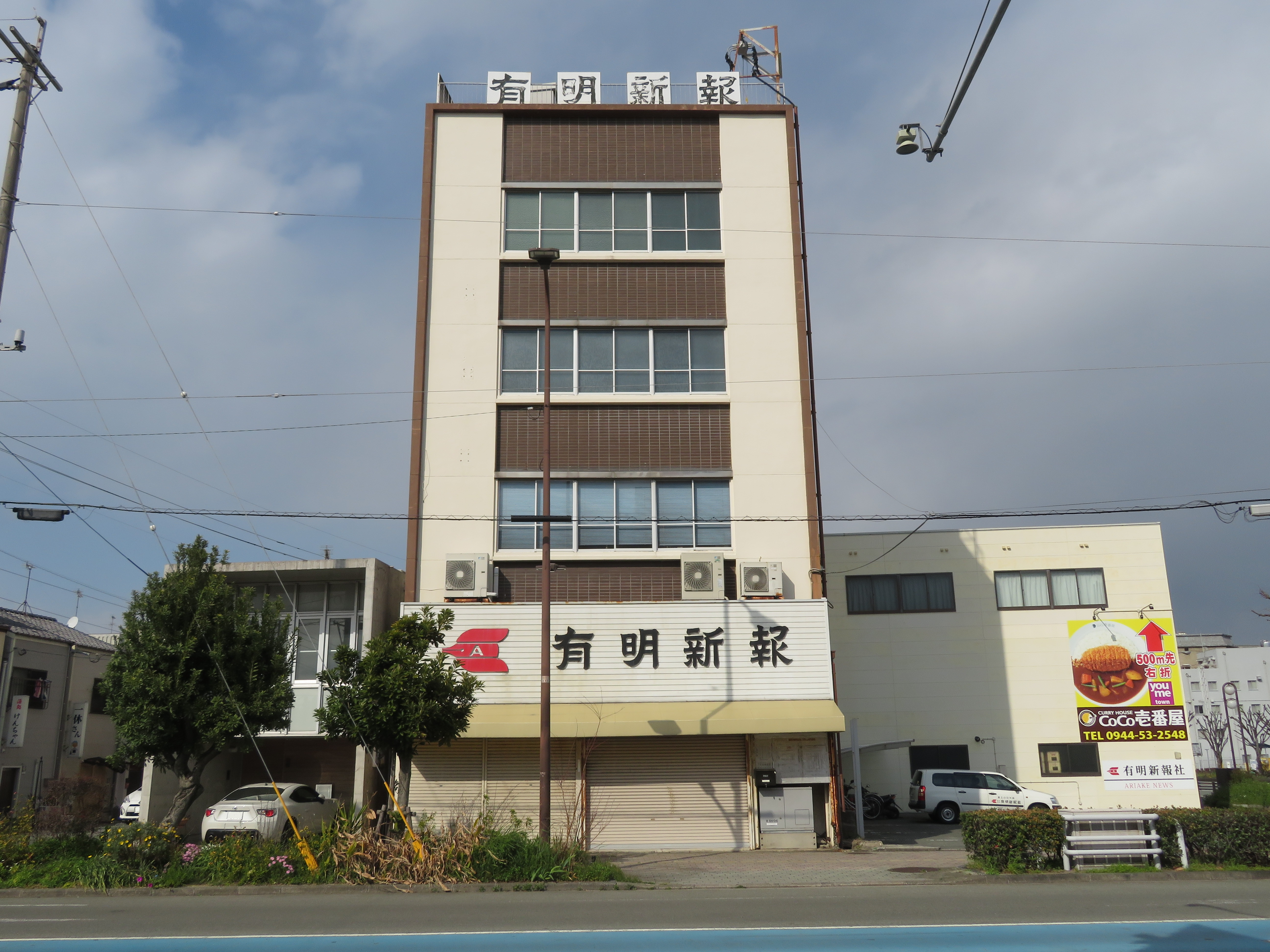 福岡県大牟田市に所在する有明新報社本社 Canon PowerShot SX720 HS